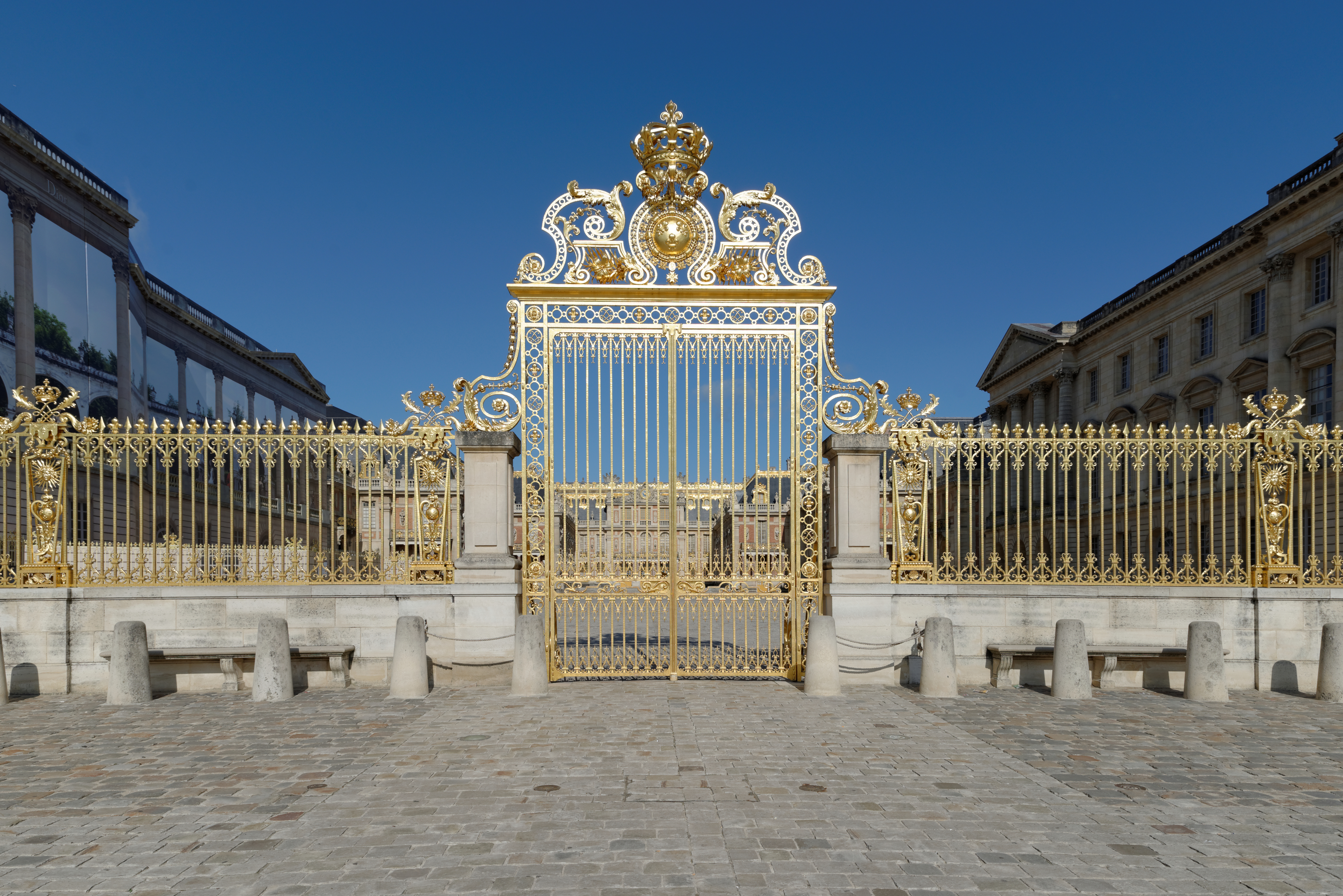 Grille royale du château de Versailles.